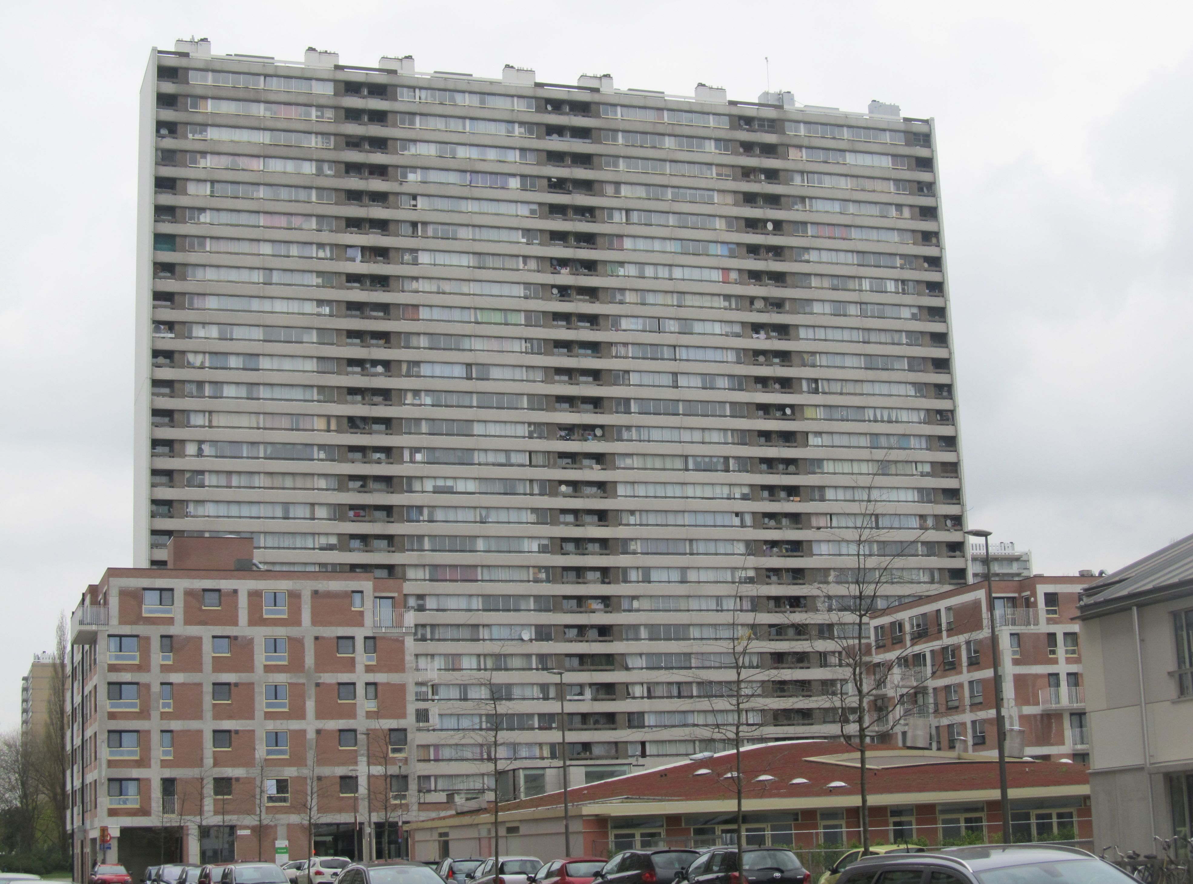 Blocul Chicago din cartierul Linkeroever din Antwerpen.